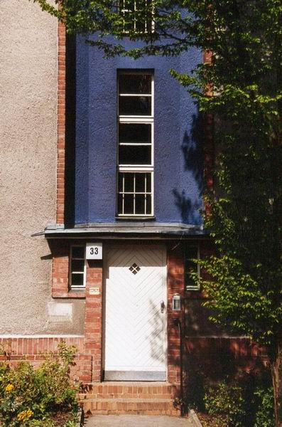 Aufnahme zeigt eine leuchtenblaue Tür der Hufeisensiedlung in Berlin-Neukölln. Photographie erstellt 09/2002 von Benutzer:Sansculotte. Bild ist unter der GNU FDL zur weiteren Verwendung freigegeben. Quellenangabe und Beleg an erbeten.